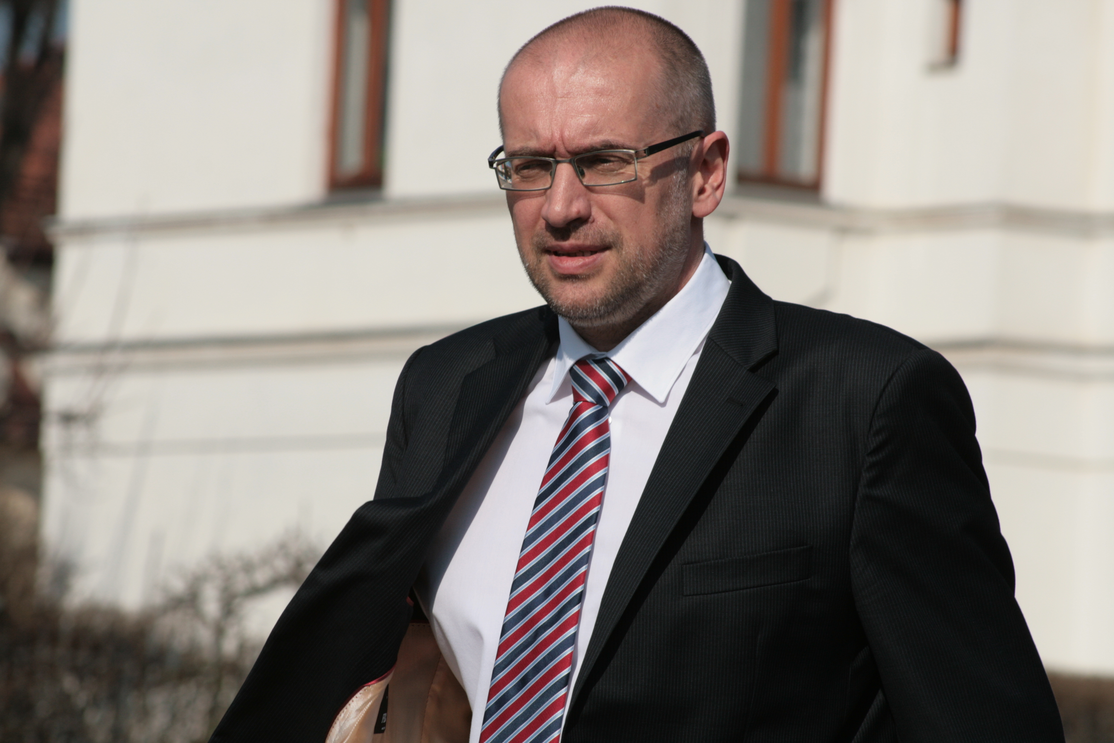 Mikuláš Bek, rektor Masarykovy univerzity v Brně. Dosluhující český prezident Václav Klaus a slovenský prezident Ivan Gašparovič se ve středu 6. března 2013 setkali ve vile Tugendhat v Brně, aby si vzájemně předali státní vyznamenání - Řád bílého lva 1. třídy a Řád bílého dvojkříže 1. třídy. ČTK: Prezidenti ČR a Slovenska si předali nejvyšší státní vyznamenání CTK: Czech and Slovak presidents present each other with state decorations